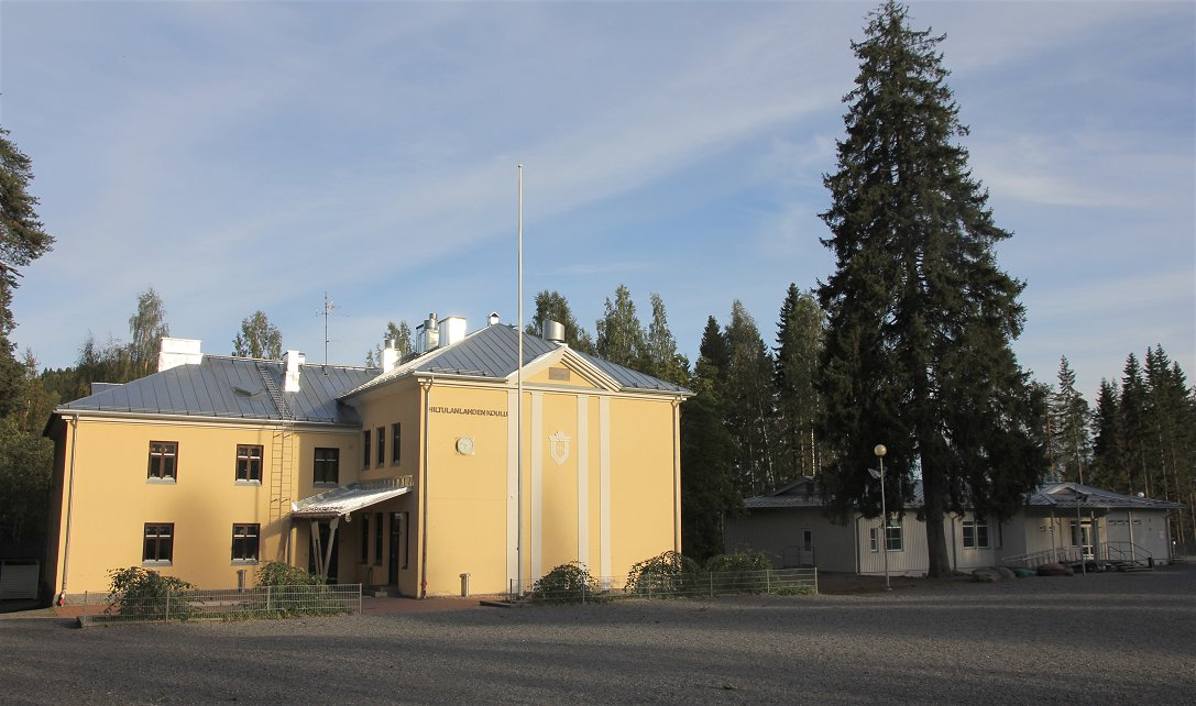 Hiltulanlahden koulu on Kuopion eteläosassa, Hiltulanlahden kaupunginosassa toimiva, suomenkielinen alakoulu (luokka-asteet 1–6). Koulun keltainen päärakennus on vuodelta 1926; sen viereen on pystytetty laajennukseksi viipalekoulu vuonna 2003.